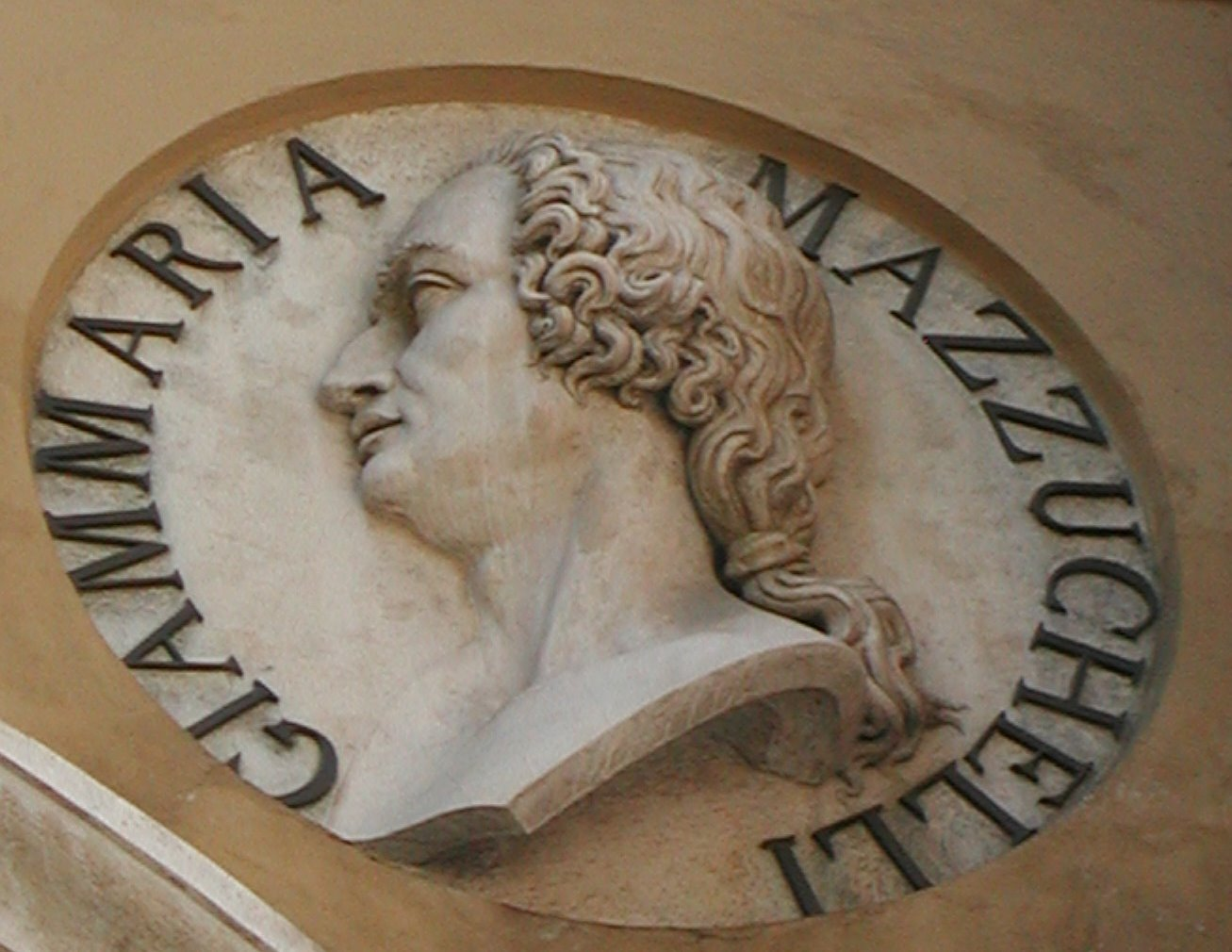 Bildnis von Giammaria Mazzuchelli (brescianischer Literat) in Brescia.